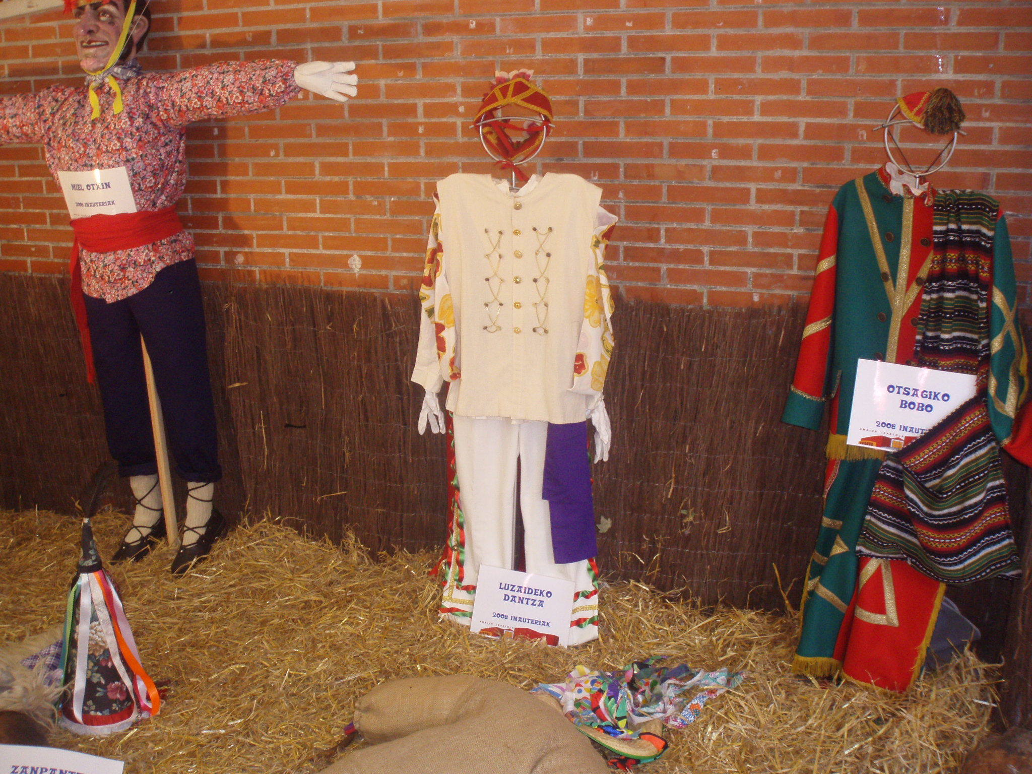 Traje de baile de Luzaide-Valcarlos expuesto en 2008 en la Ikastola Amaiur de Iruñea-Pamplona